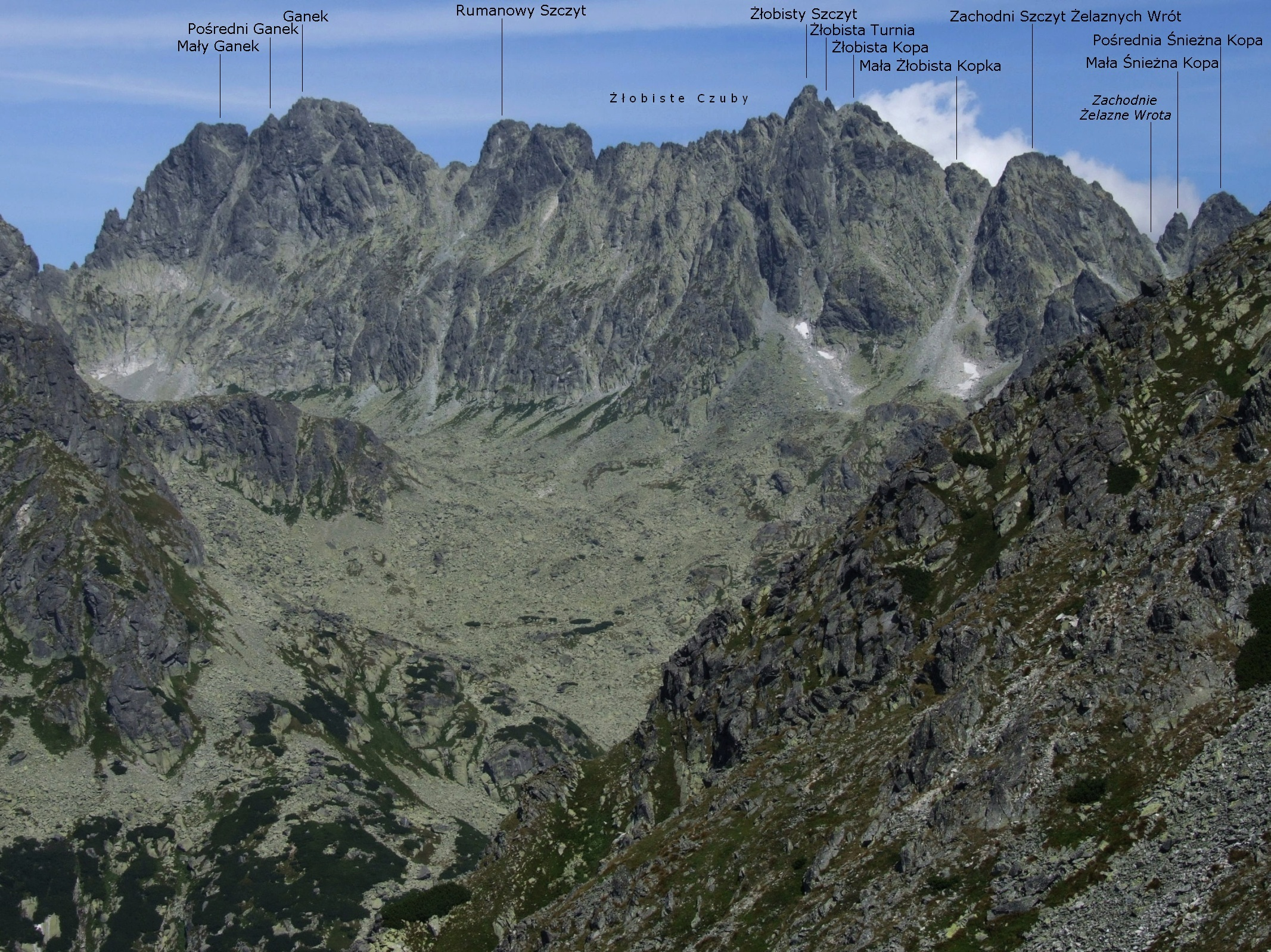 Widok od południowej strony (z podejścia na Przełecz pod Osterwą)